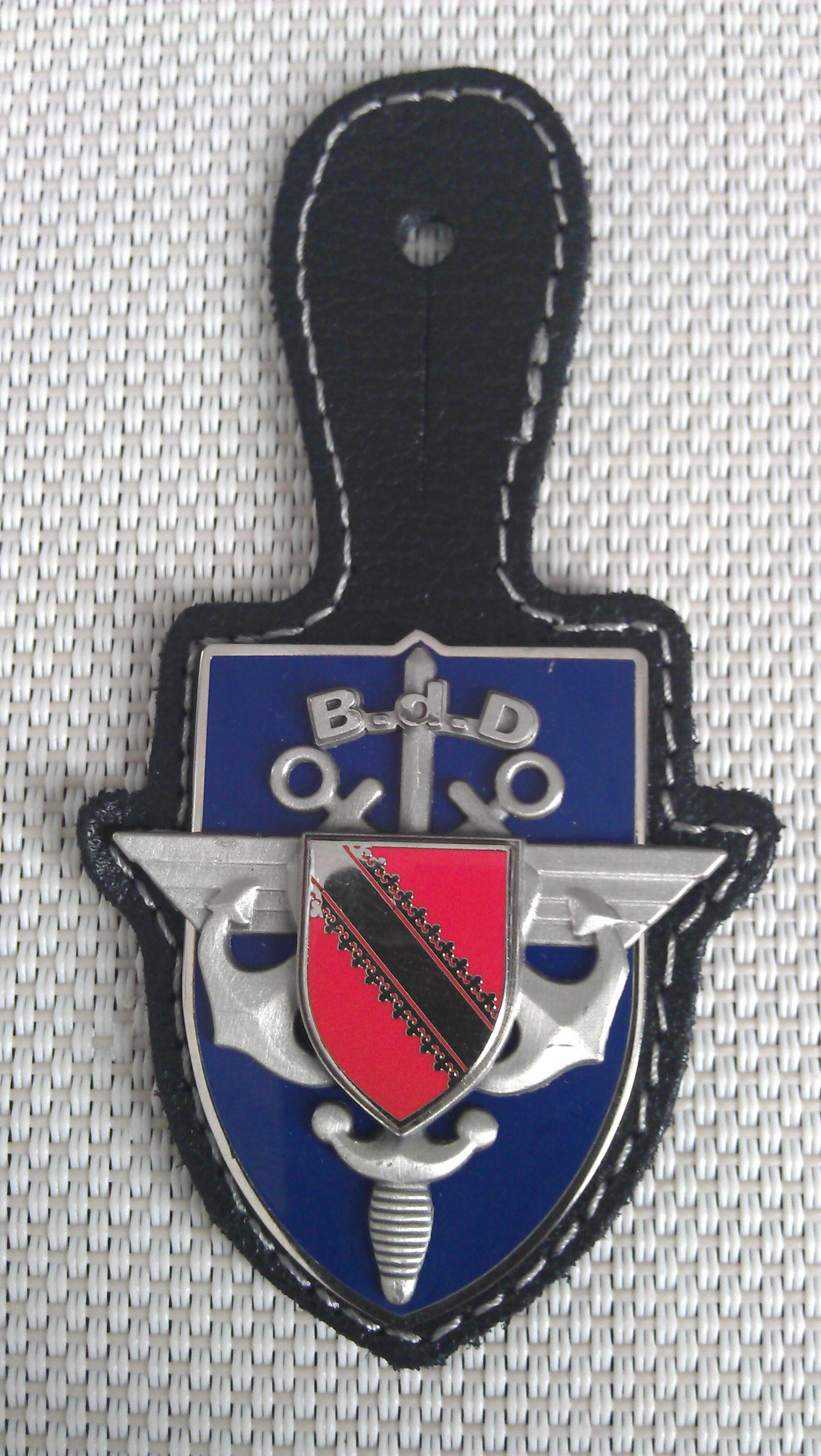 Insigne "Base de Défense" avec son attache boutonnière en cuir.